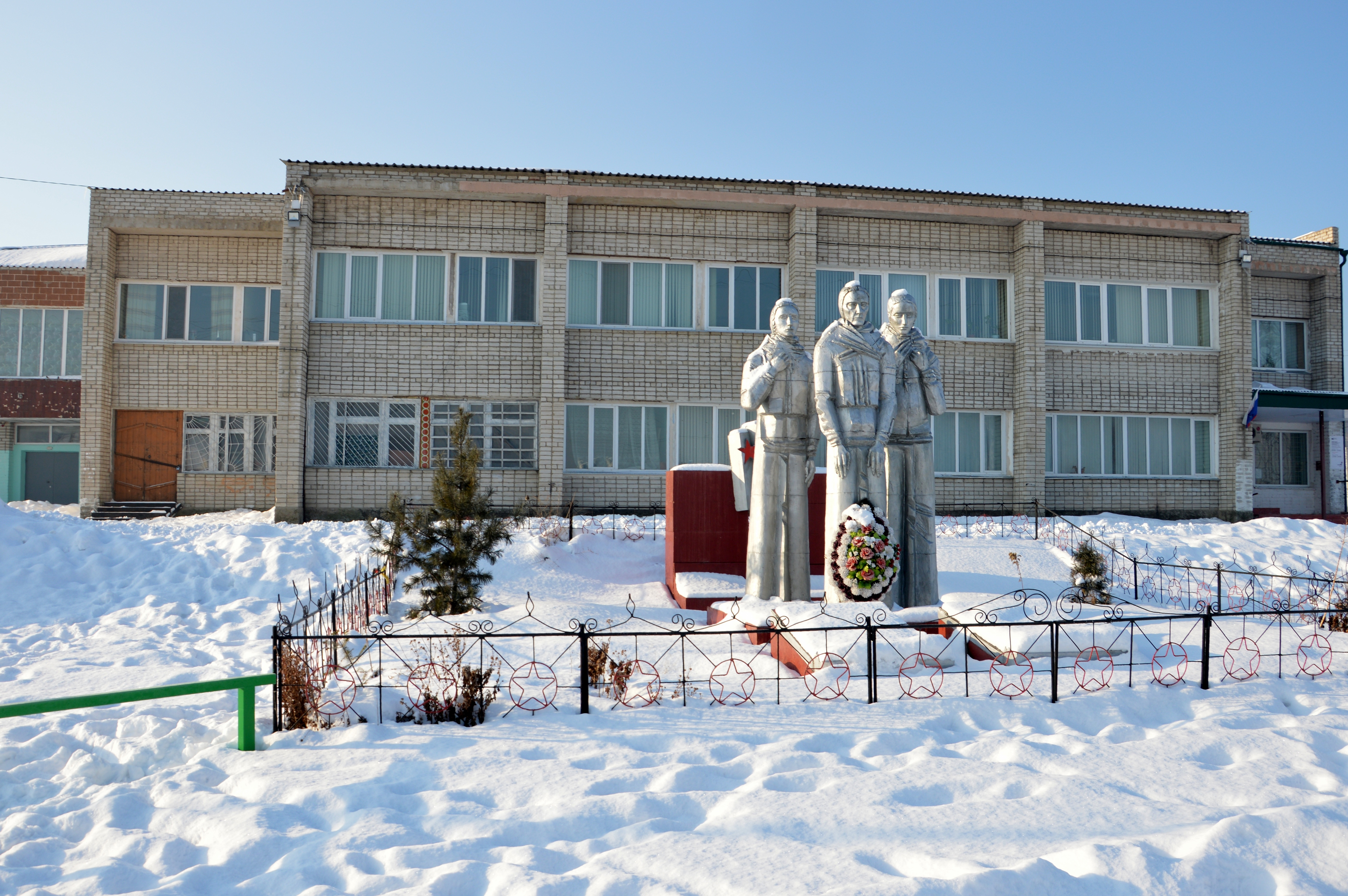 Здание Администрации с. Барабаш Хасанского района Приморского края, Россия